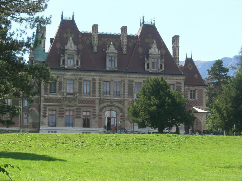 Schloss Rothschild (Reichenau a. d. Rax)